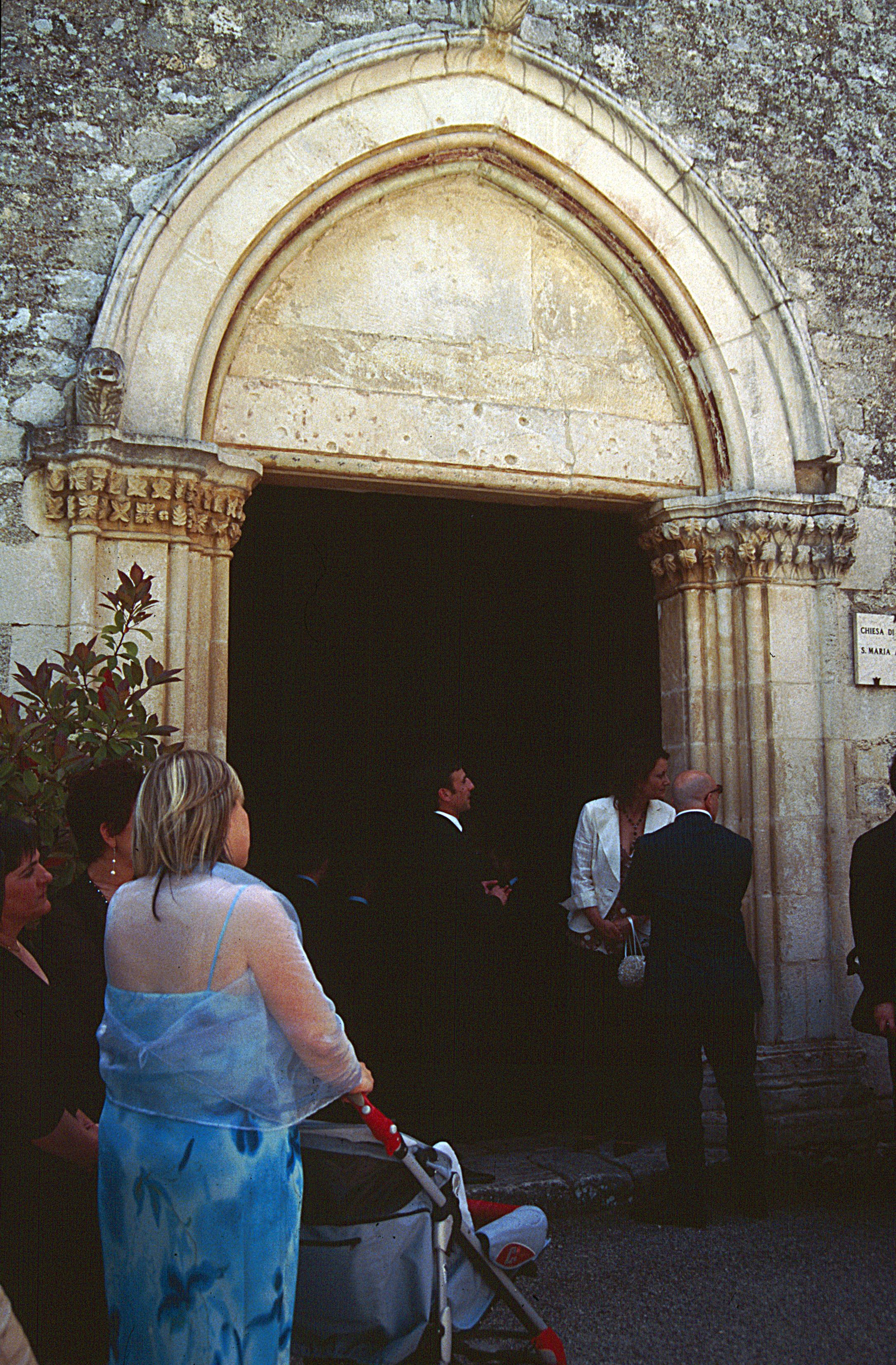 Santa Maria ad Cryptas in Fossa, Portal